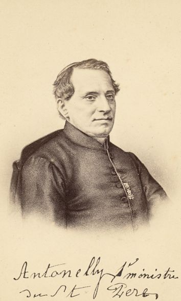 Photo, Motiv: Giacomo Antonelli (1806-1876) römischer Kardinal und Kardinalstaatssekretär.